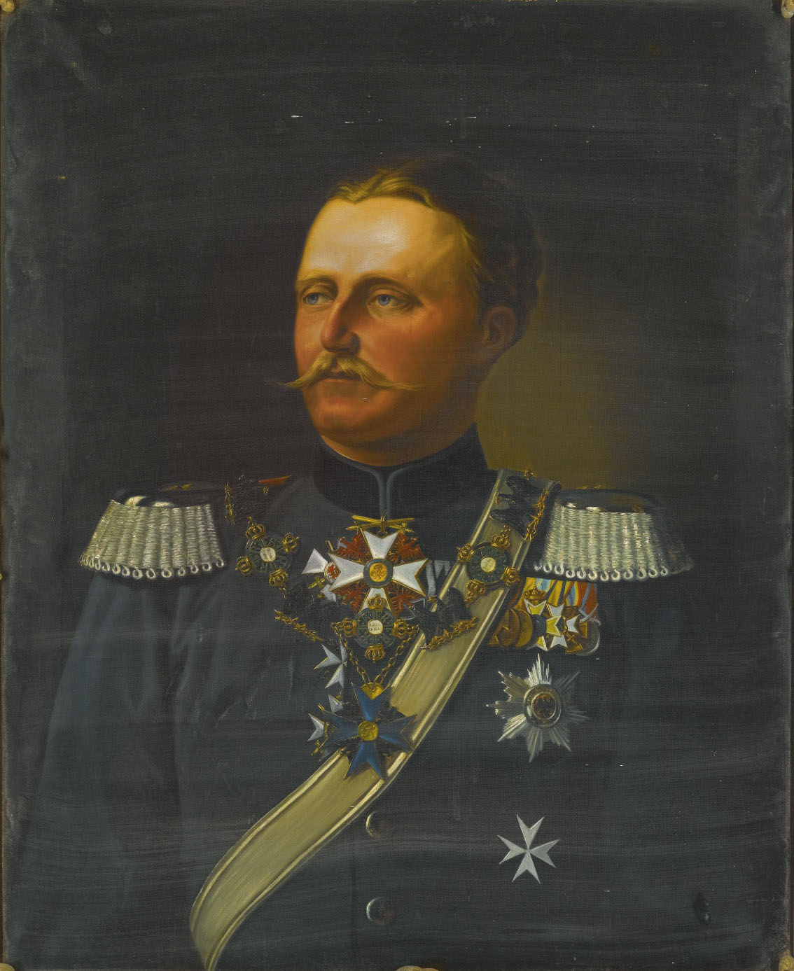 GEORG FÜRST ZU SCHWARZBURG-RUDOLSTADT